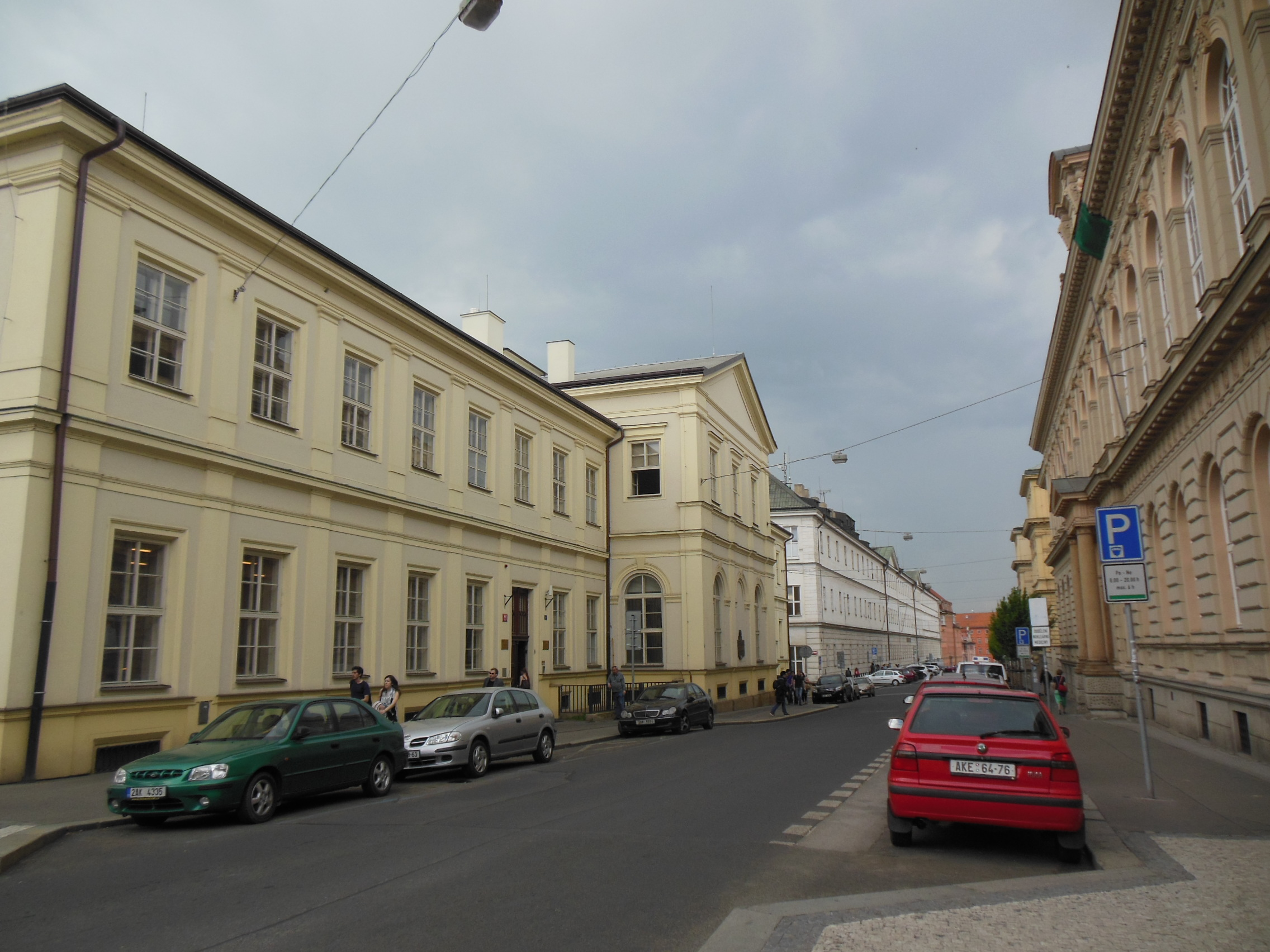 Ulice U Nemocnice na Novém Městě v Praze.